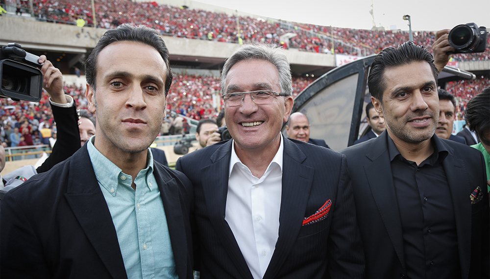 علی کریمی، برانکو ایوانکوویچ و افشین پیروانی - دیدار تیم های پرسپولیس و سپیدرود رشت در هفته سی ام لیگ برتر - اردیبهشت ۱۳۹۷